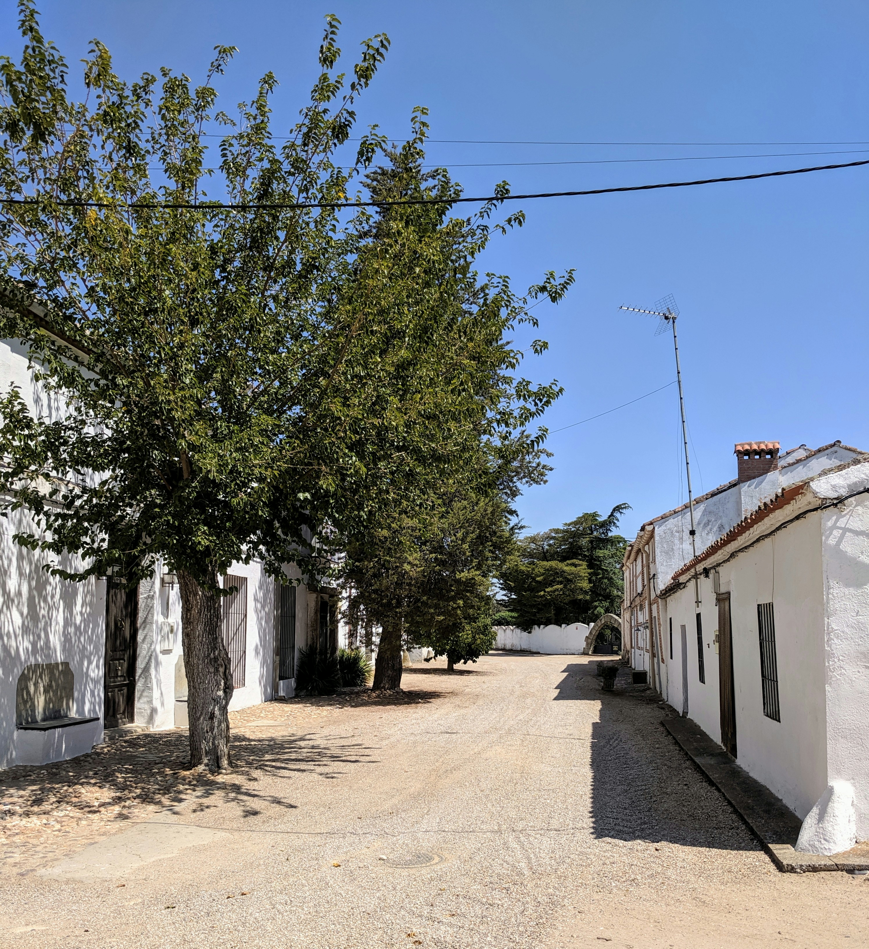 Calle en Illán de Vacas (Toledo, España).